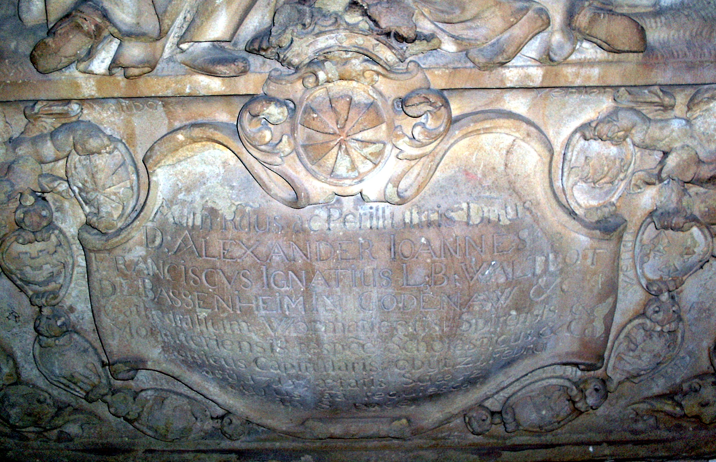 Inschrift vom Epitaph des Domscholasters Alexander Johannes Franziskus Ignatius Waldbott von Bassenheim (1667-1715), Speyerer Dom